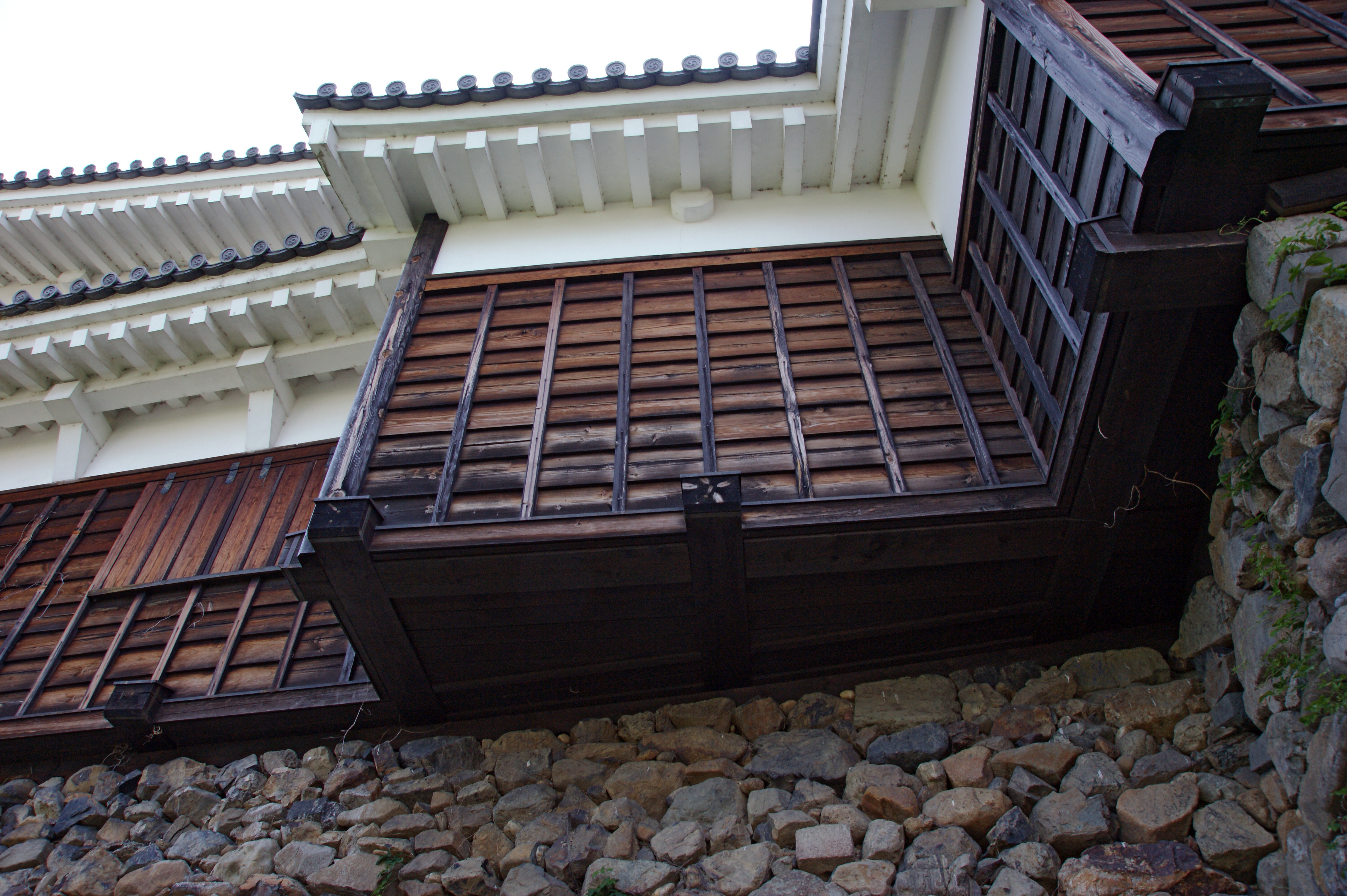 Fukuchiyama Castle in Fukuchiyama, Kyoto prefecture, Japan